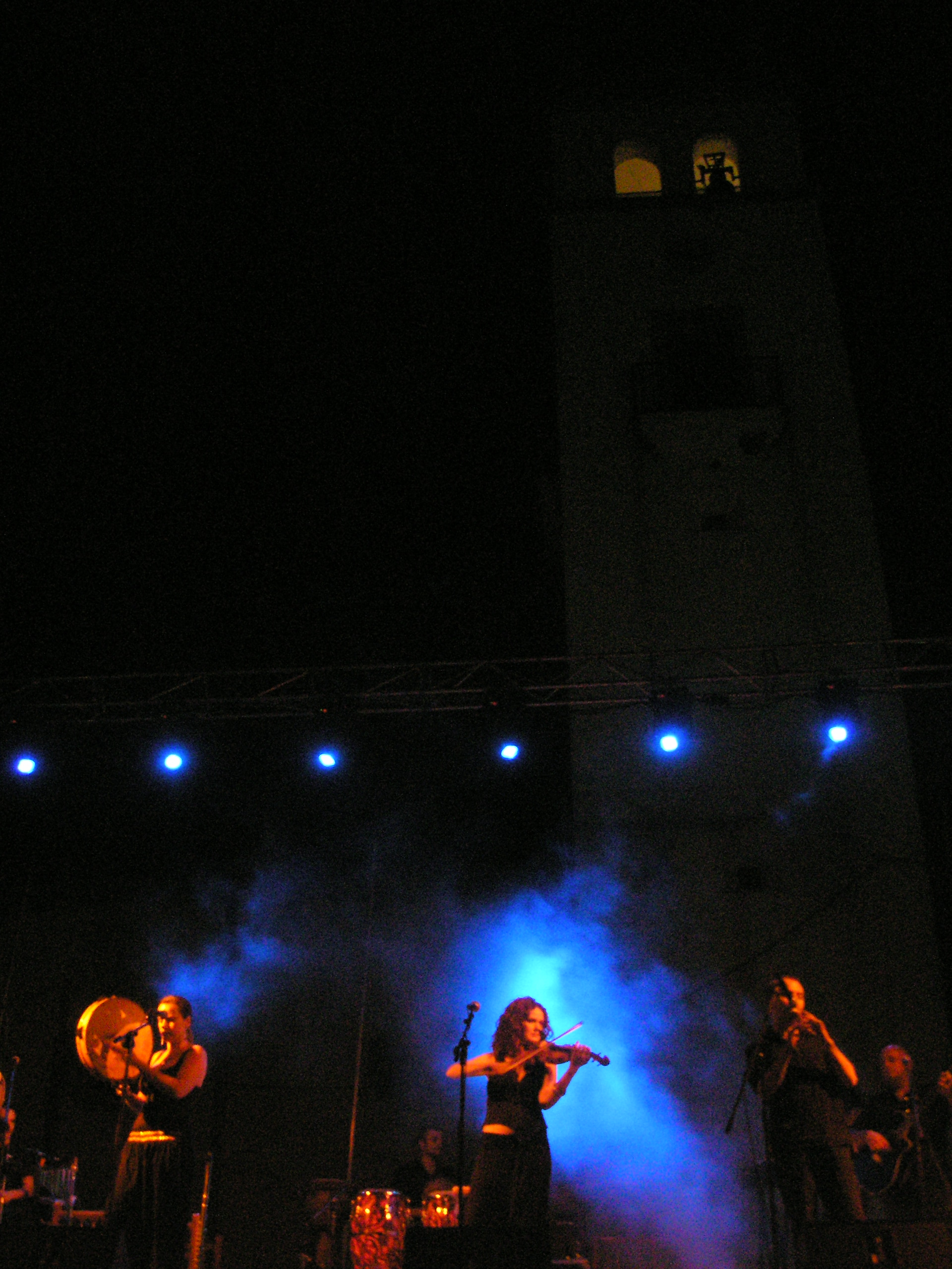 Estremeñu: La banda Acetre tocandu en Valdelacarçá